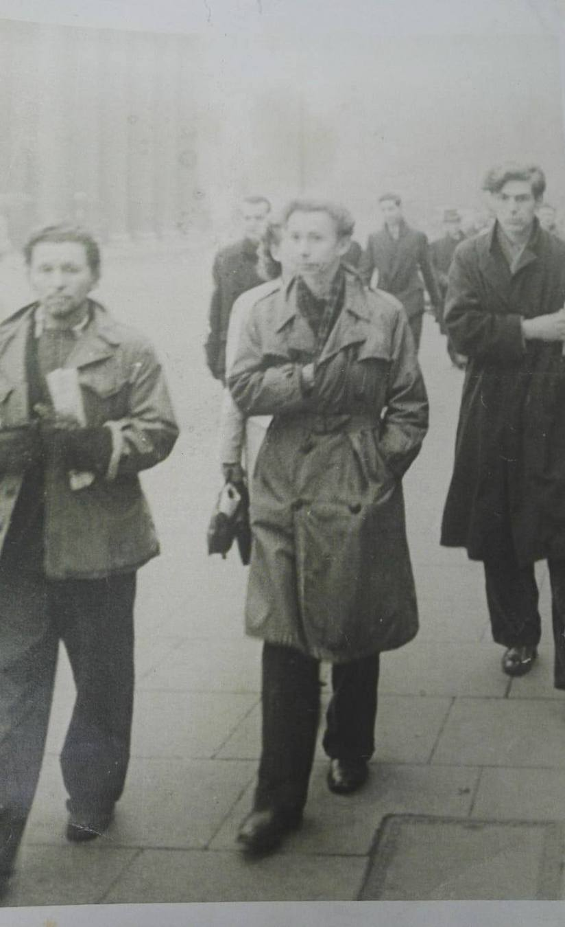 Konstnären Dennis Creffield (1931-2018) på en gata i Stockholm i samband med en grupputställning med unga brittiska konstnärer på Galleri Gummeson